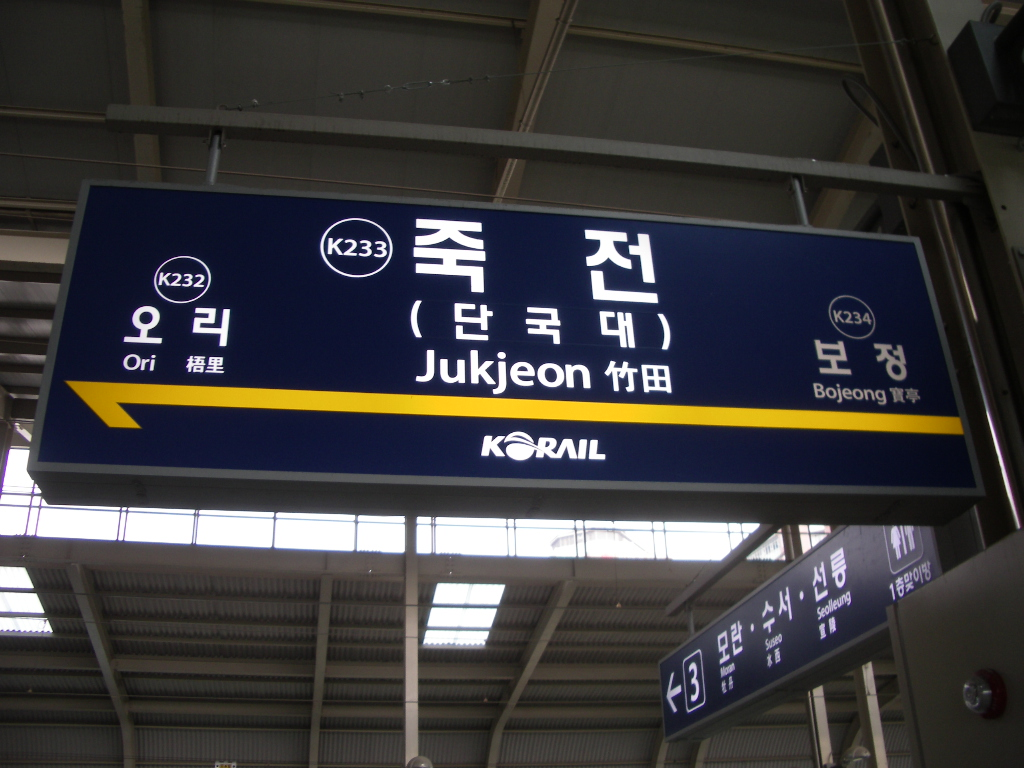 죽전역 역명판